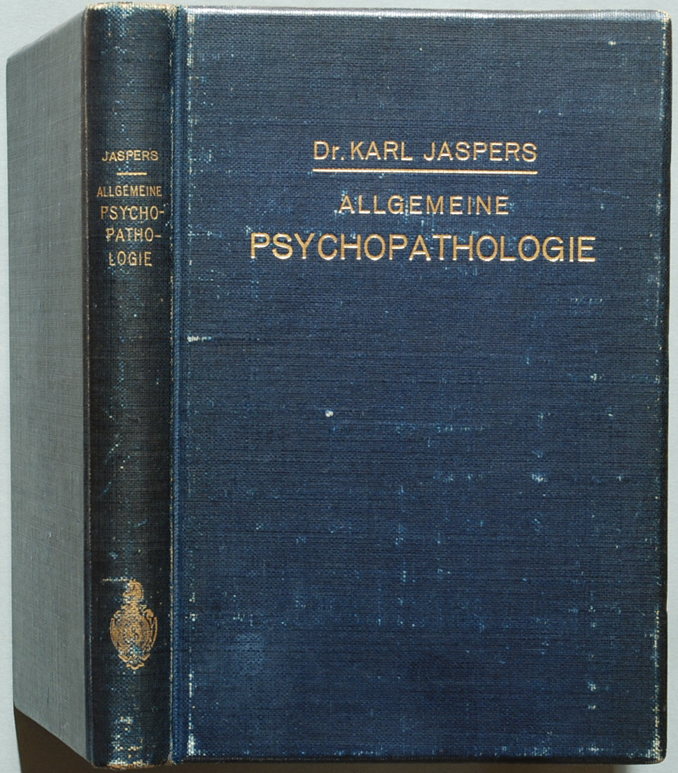 Jaspers, Karl: Allgemeine Psychopathologie. Ein Leitfaden für Studierende, Ärzte und Psychologen. Berlin: J. Springer 1913, 338 Seiten + 1 Blatt Verlagsanzeigen. Erstausgabe.